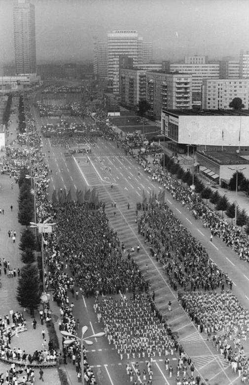 Berlin, 10. Weltfestspiel, Demonstration ADN-ZB Mittelstädt 4.8.73 Berlin:Festival-Demonstrationszug-Vor den Augen der Weltjugend legte die junge Generation der DDR am 4.8.73 ein machtvolles Bekenntnis zu ihrem sozialistischen Staat ab.Zehntausende FDJler vereinten sich zu einem faszinierenden Demonstrationszug durch die Straßen der Festivalstadt.Blick auf die Karl-Marx-Allee.